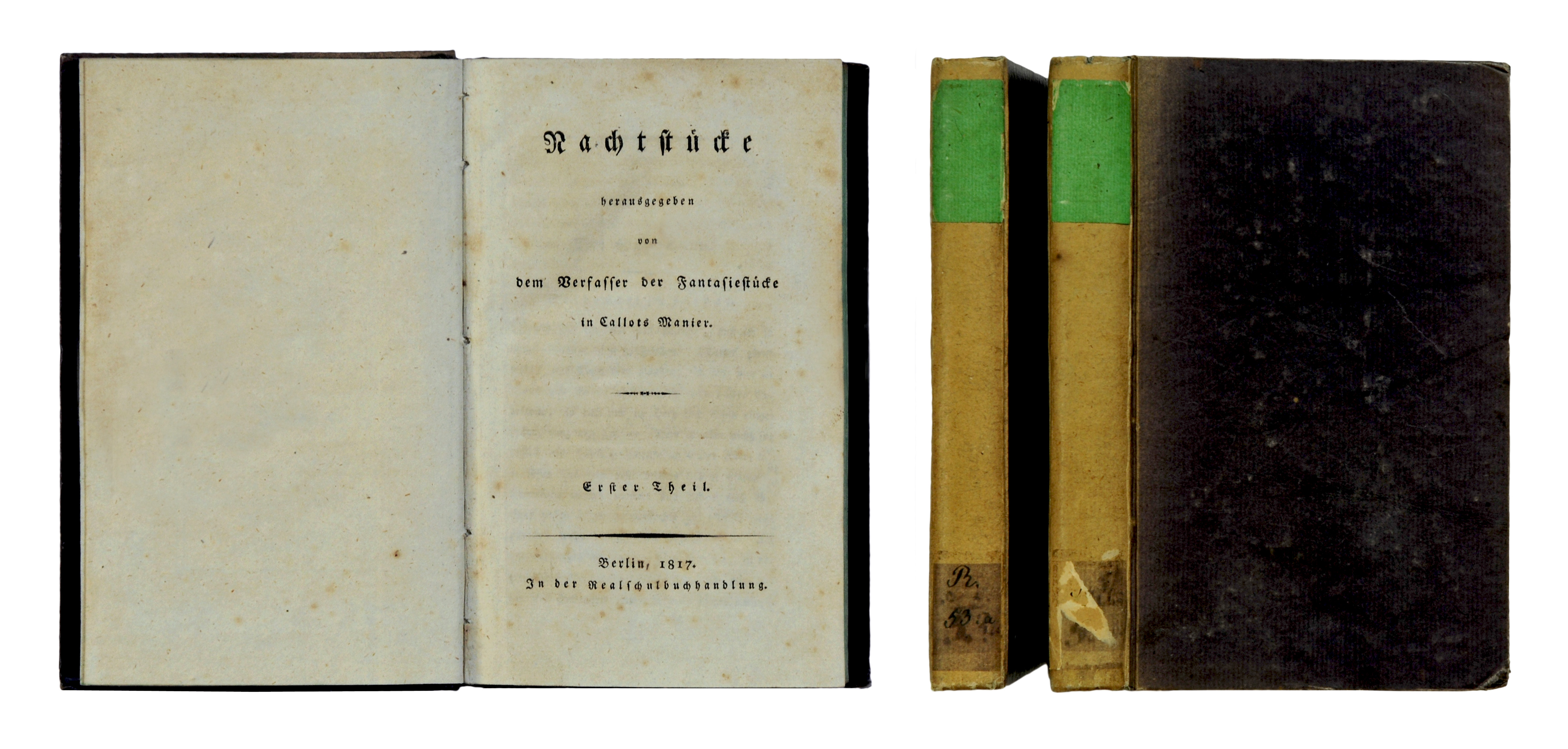 [Hoffmann, E. T. A.:] Nachtstücke herausgegeben von dem Verfasser der Fantasiestücke in Callots Manier. Berlin: Realschulbuchhandlung 1817, 2 Bde.:321 S., 374 S., Erstausgabe. Foto H.-P.Haack.